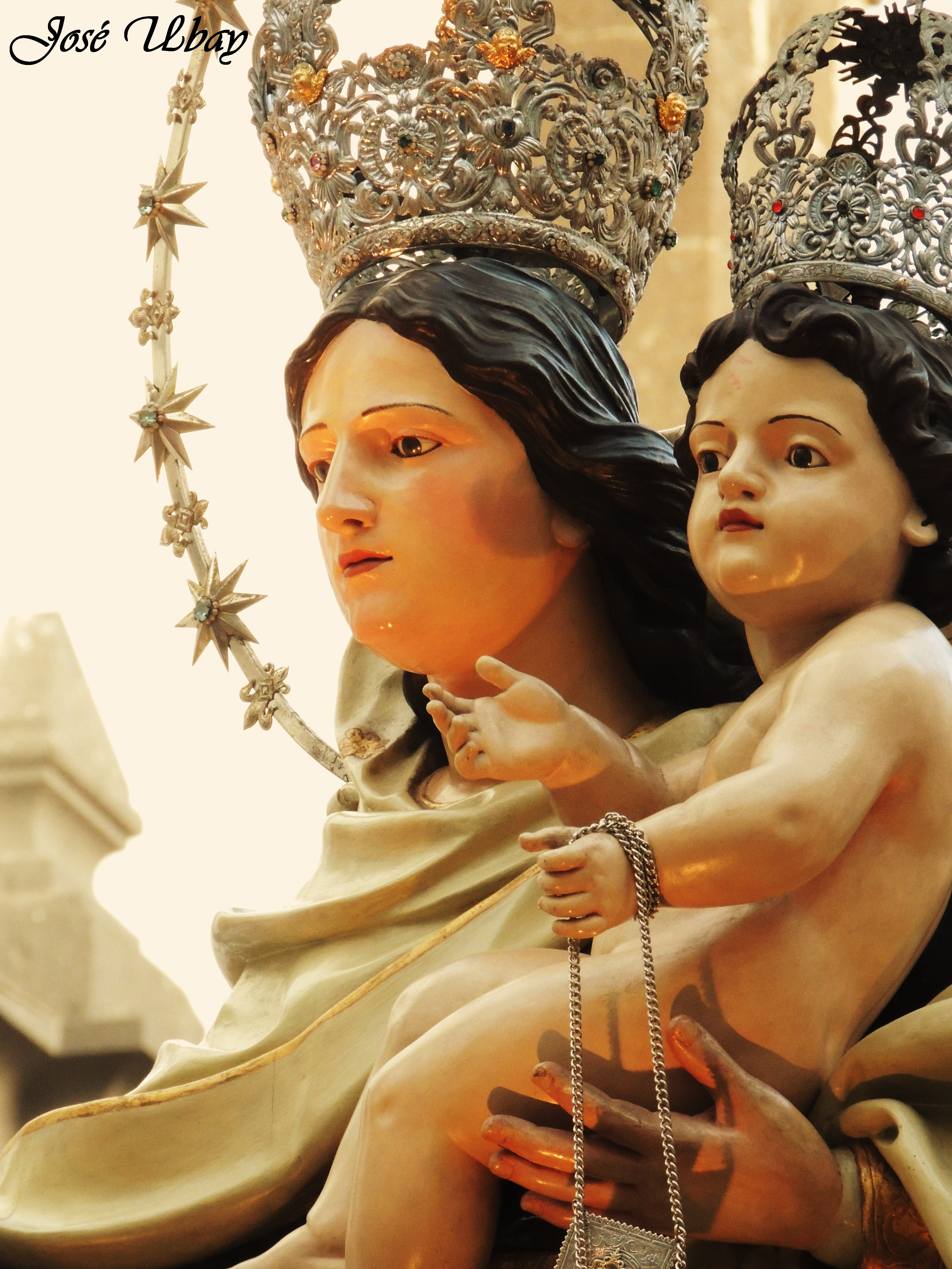 Nuestra Señora del Monte Carmelo. 1815. José Luján Pérez. Parroquia de San Agustín de Hipona y Santuario de Santa Rita de Cassia. Las Palmas de Gran Canaria.